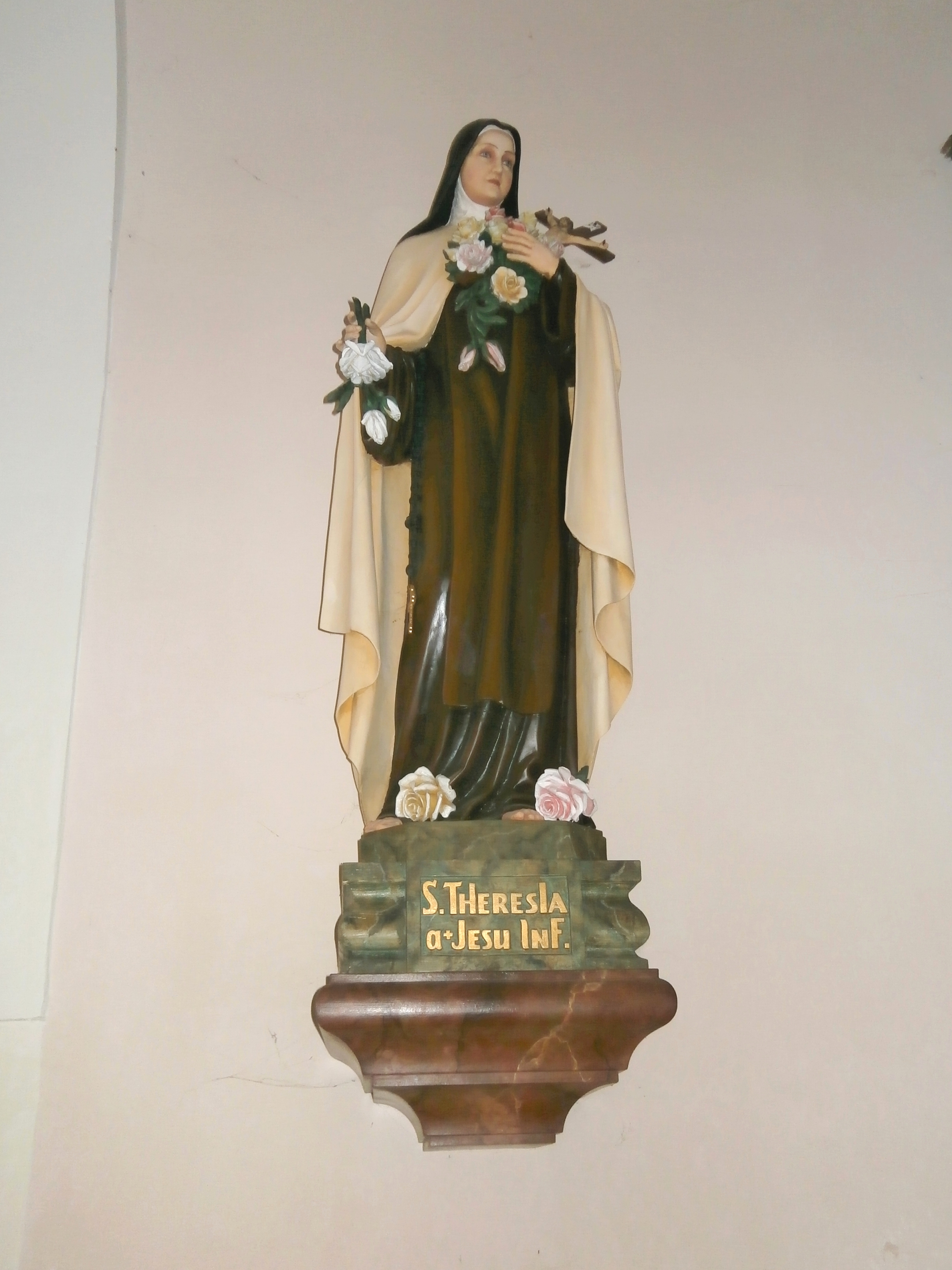 Kostel sv. Anny